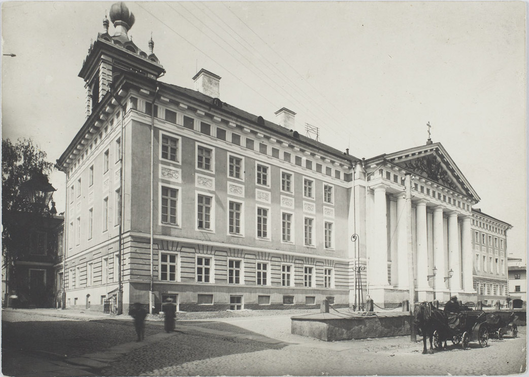 Tartu ülikool 1914